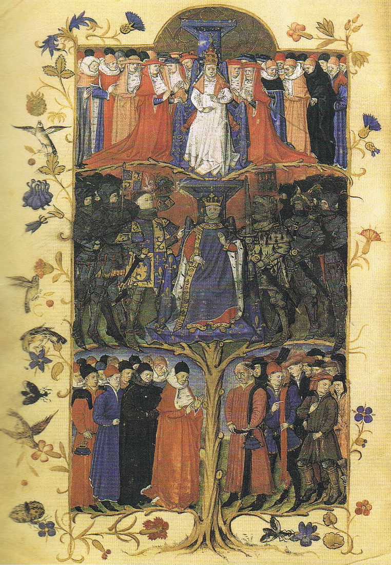 Miniature représentant les trois ordres (le clergé, la noblesse et le Tiers État) dans L'arbre des batailles de Honorat Bovet. Au centre, le roi Charles VII entouré du dauphin Louis et du connétable Arthur de Richemont. Paris, BnF, Bibliothèque de l'Arsenal, ms. 2695 folio 6v.